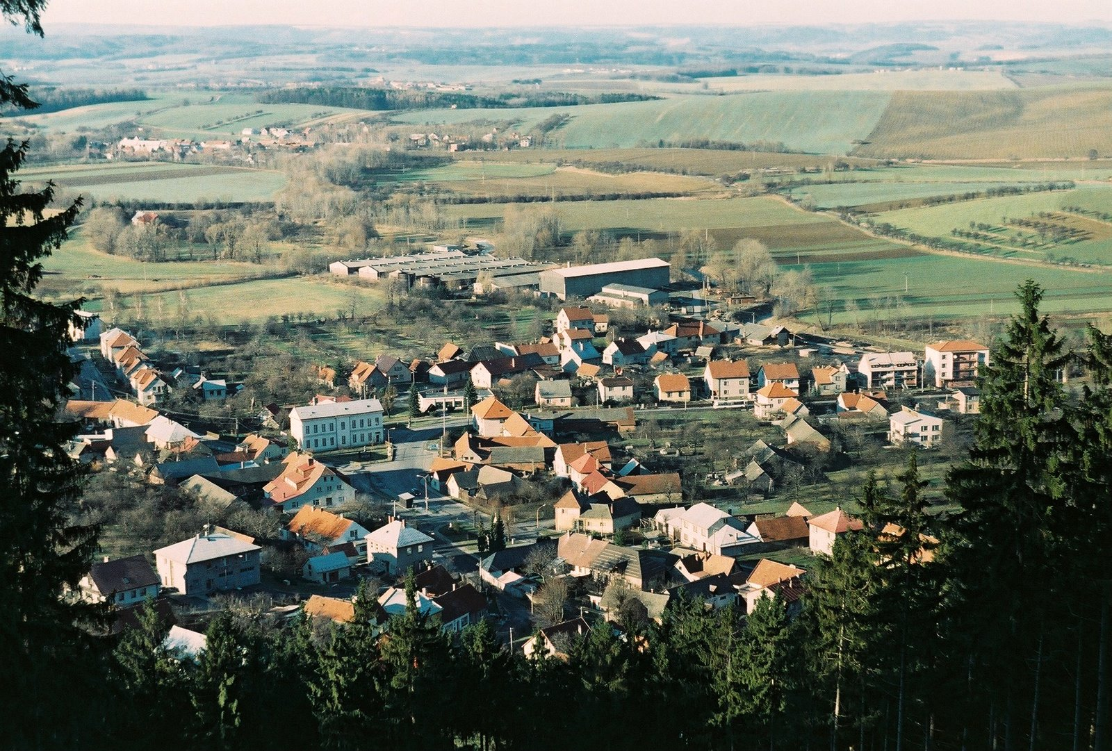 Pohled na Podhradní Lhotu z vyhlídkové lavičky u Zubříče. Nevyvolaný film s touto fotkou se povaloval po šuplících asi 8 let, takže výsledek je myslím více než dobrý.